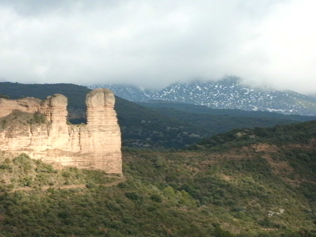 También se llama Peña Falconera, cerca de la localidad de Morrano.